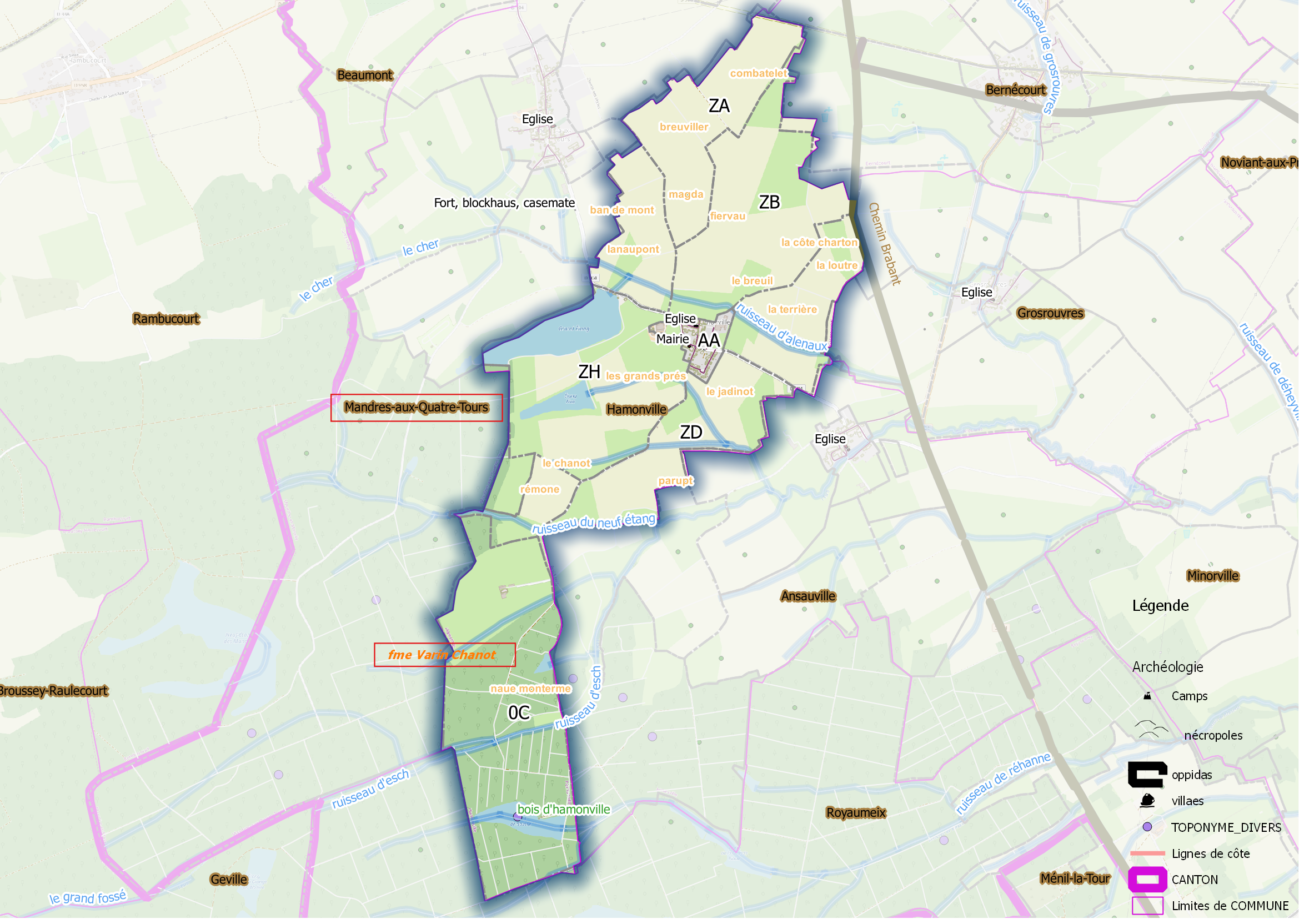 Hamonville (ban communal) OSM et Qgis, mentions additionnelles